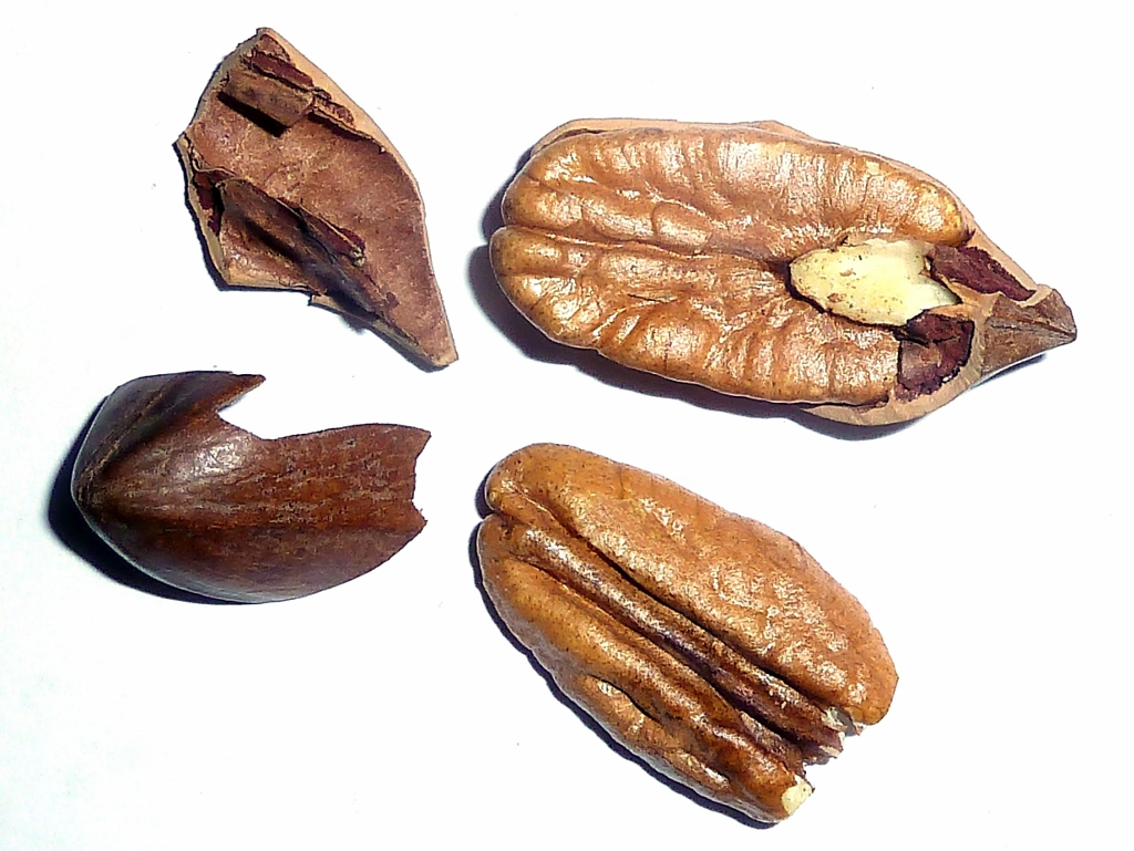 Carya illinoinensis (Nuez de Pecán) - Trima abierta sin su epicarpio ni mesocarpio, con un de los dos cotiledones de la semilla in situ en su endocarpio pétreo y el otro separado y suelto. - Comercio, procedencia desconocida, Madrid (España).